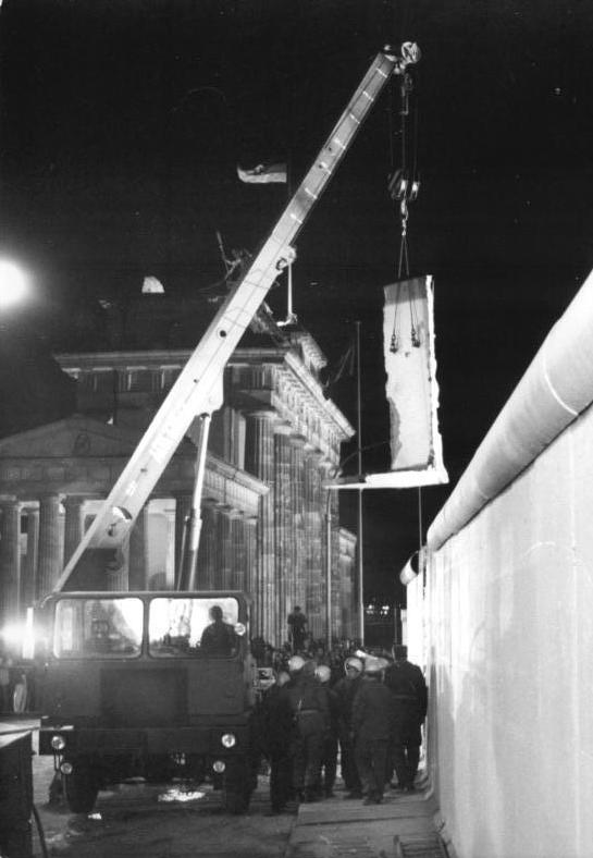 ADN-ZB-Grimm-22.12.89-Berlin: Brandenburger Tor-Am Platz vor dem Brandenburger Tor begannen in der Nacht zum 22. Dezember die Bauarbeiten zur Eröffnung der Grenzübergangsstelle für Fußgänger. Angehörige der DDR-Grenztruppen gingen mit Hilfe von Technik unmittelbar vor dem historischen Bauwerk daran, Betonelemente aus der Mauer herauszulösen.